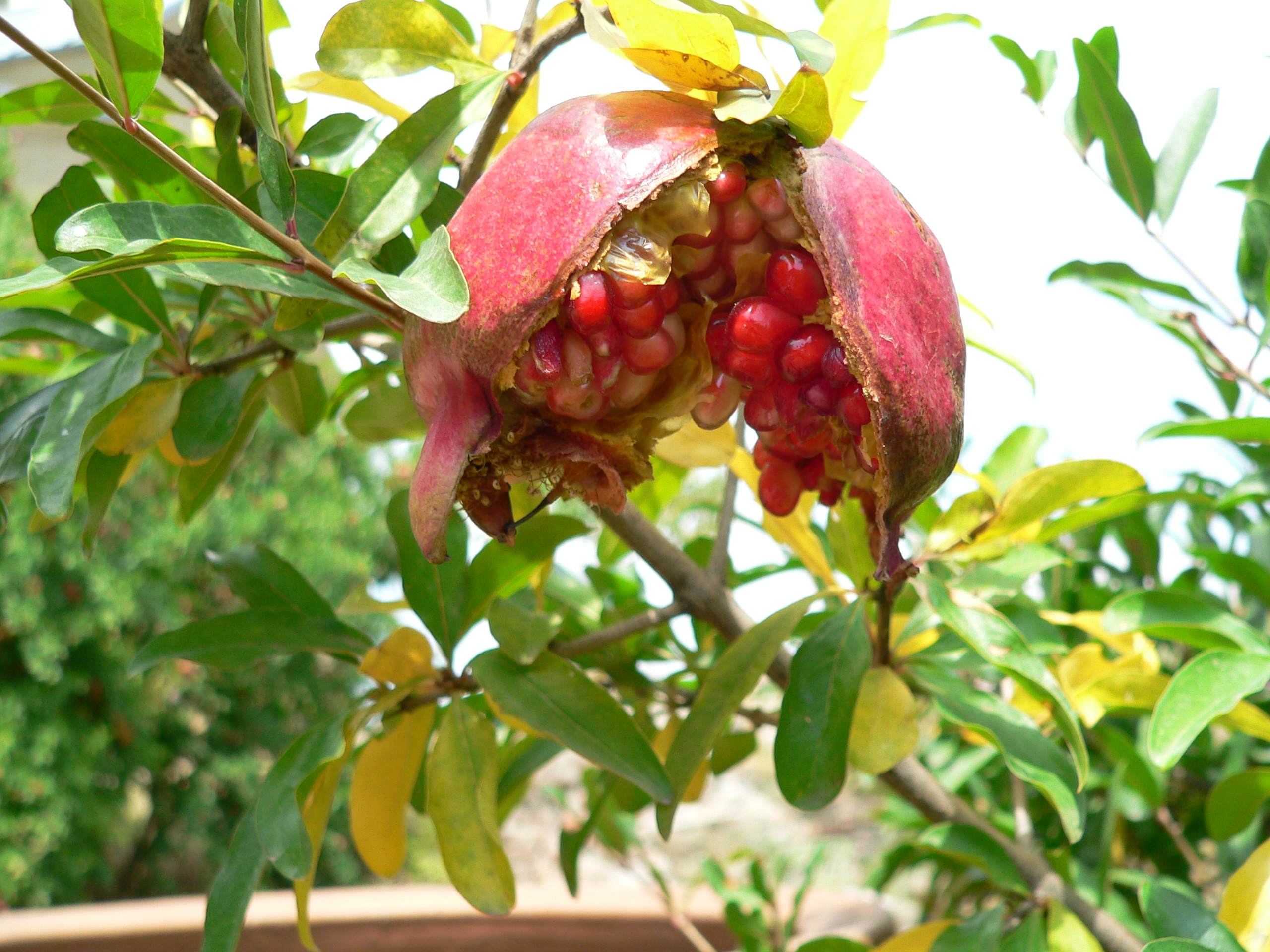 Pomegranate